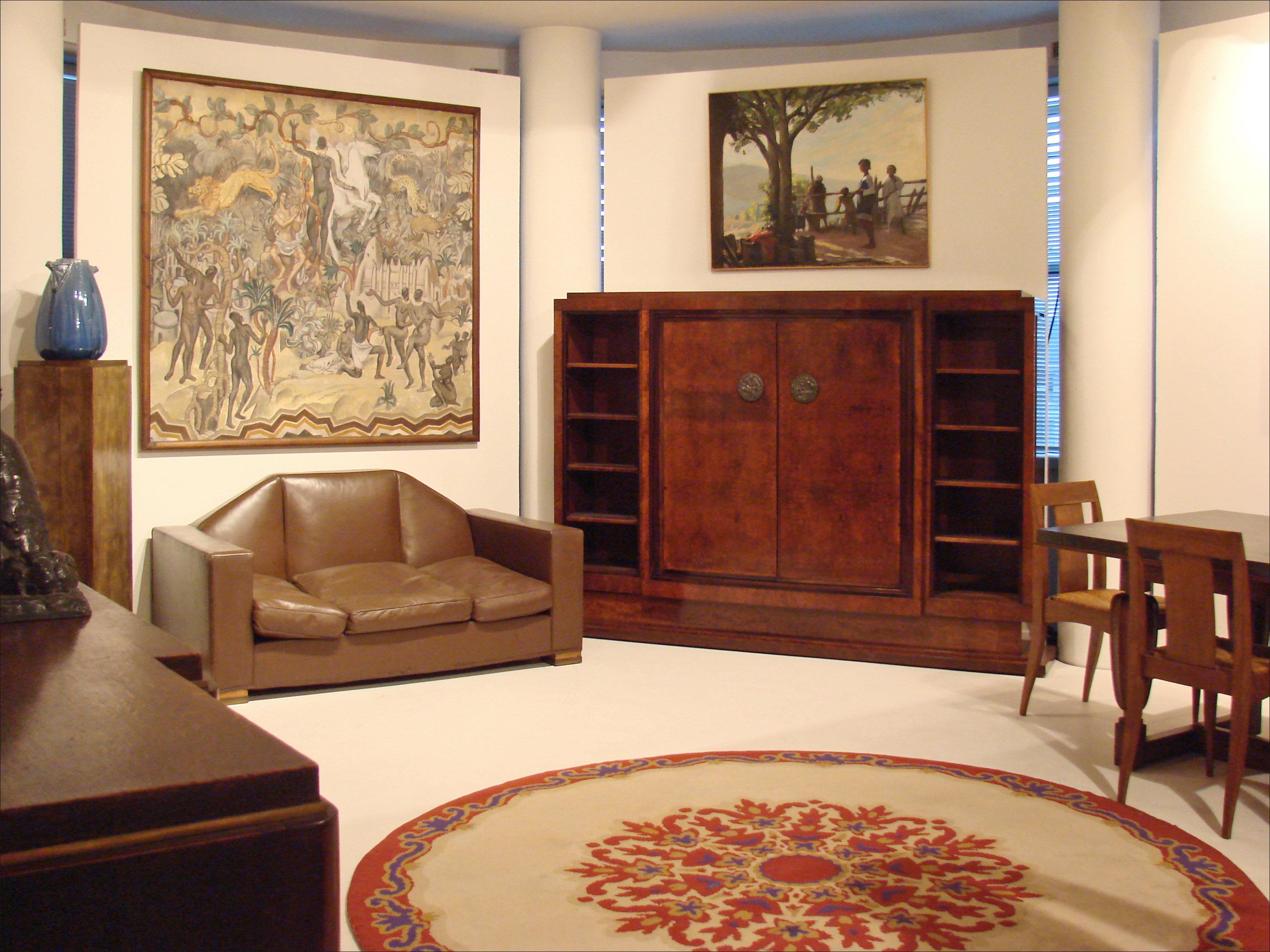 Ruhlmann et Joseph Bernard L'ensemble du mobilier provient de la maison de Boulogne de Joseph Bernard. Ce dernier, sculpteur, a demandé en 1920 à Jacques-Emile Ruhlmann de réaliser le mobilier intérieur d'une maison qu'il venait d'acheter et de faire rénover à Boulogne-Billancourt pour y habiter et disposer d'un atelier. Musée des années 30. Boulogne-Billancourt